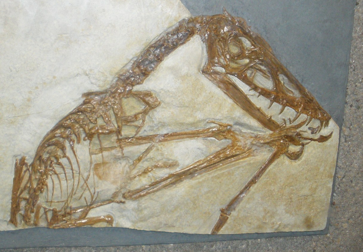 Fossil of Scaphognathus, an extinct pterosaur- Took the photo at Senckenberg Museum of Frankfurt